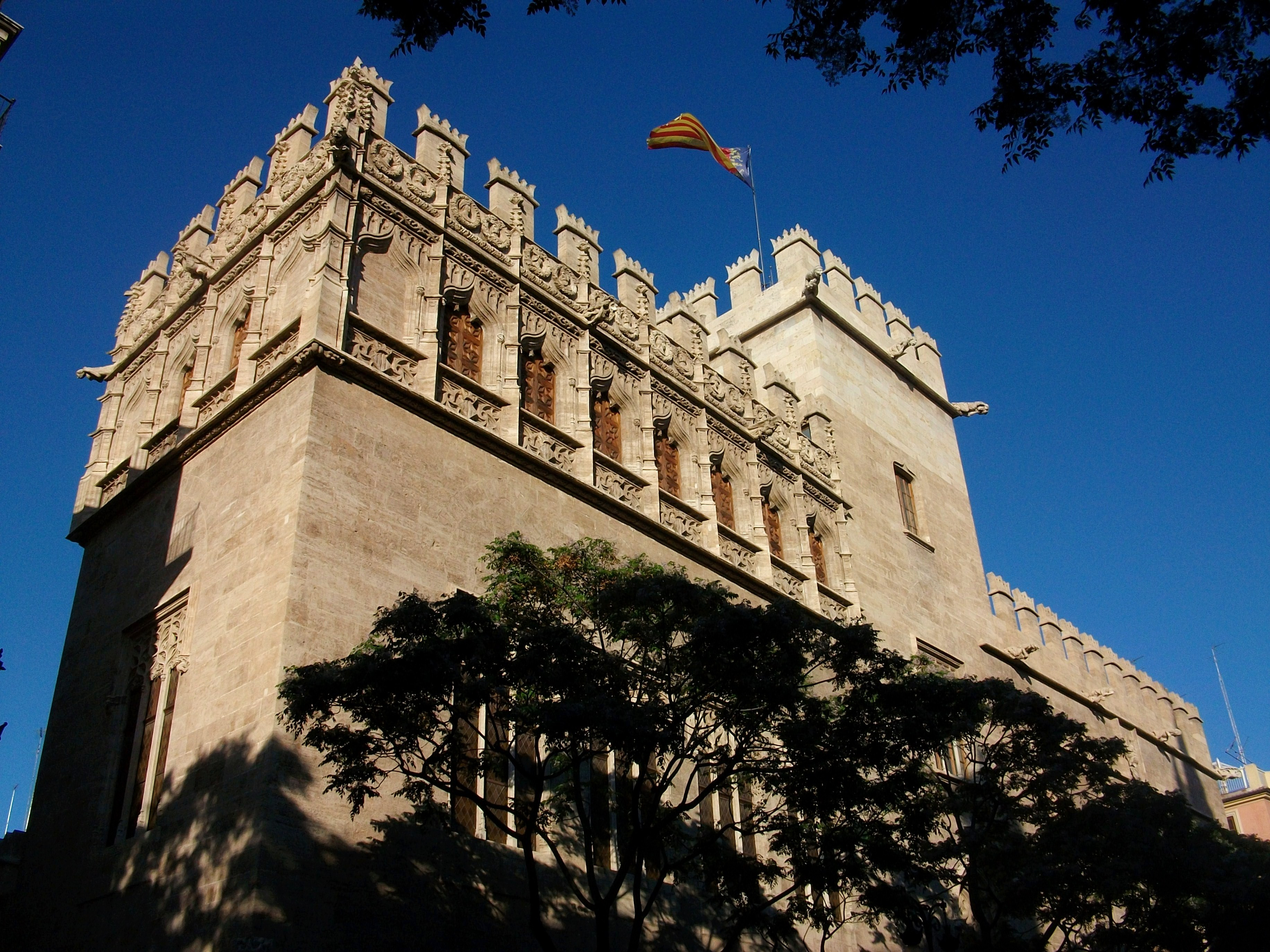 Vista de l'edifici de la Llotja de la Seda o de Mercaders, en primer pla el cos del Consolat del Mar, València.